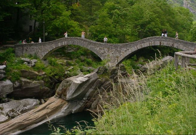 Ponte dei Salti (Lavertezzo, Valle de Versasca, Tessin)